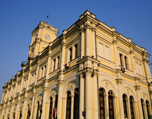 Leningradsky Rail Terminal